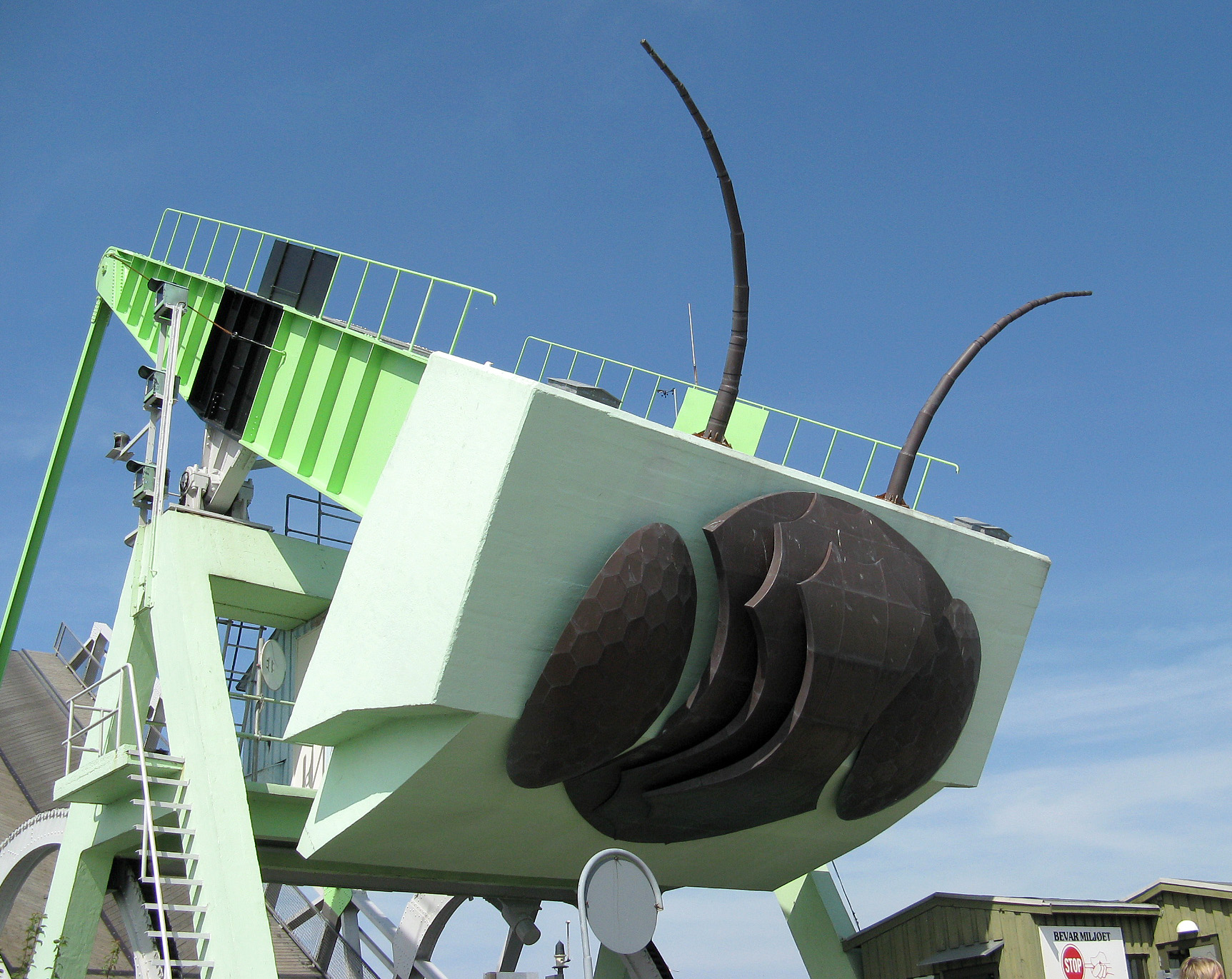 Græshoppebroen i Karebæksminde ved Næstved, på Sjælland i Denmark